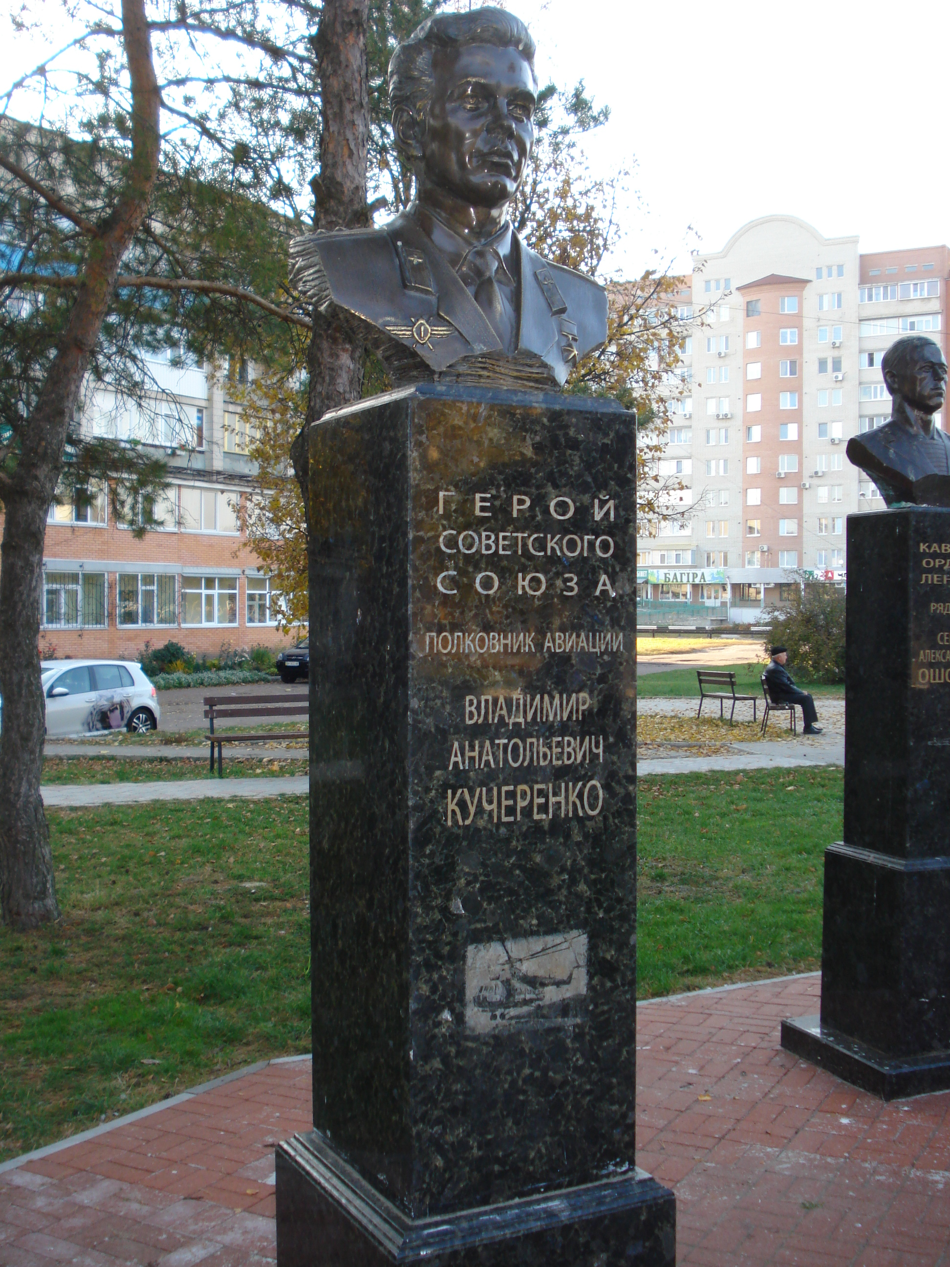 Погруддя Героям Радянського Союзу В.А. Кучеренку, П.В. Рубану, В.П. Маргелову, Суми, вул. Г. Кондратьєва, сквер навпроти державного ліцею-інтернату «Кадетський корпус» ім. І. Г. Харитоненка